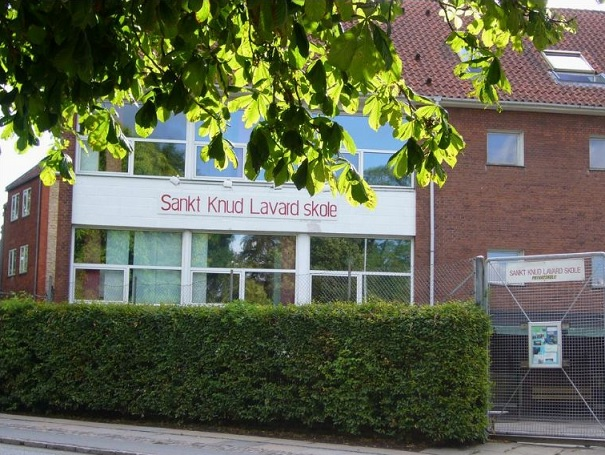 Sankt Knud Lavard Skoles hovedbygning og lidt skolegård set fra Toftebæksvej i Kgs. Lyngby.